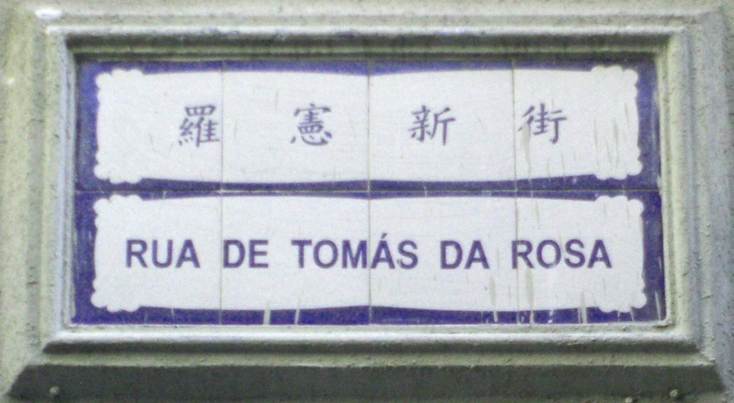 Rua de Tomás da Rosa